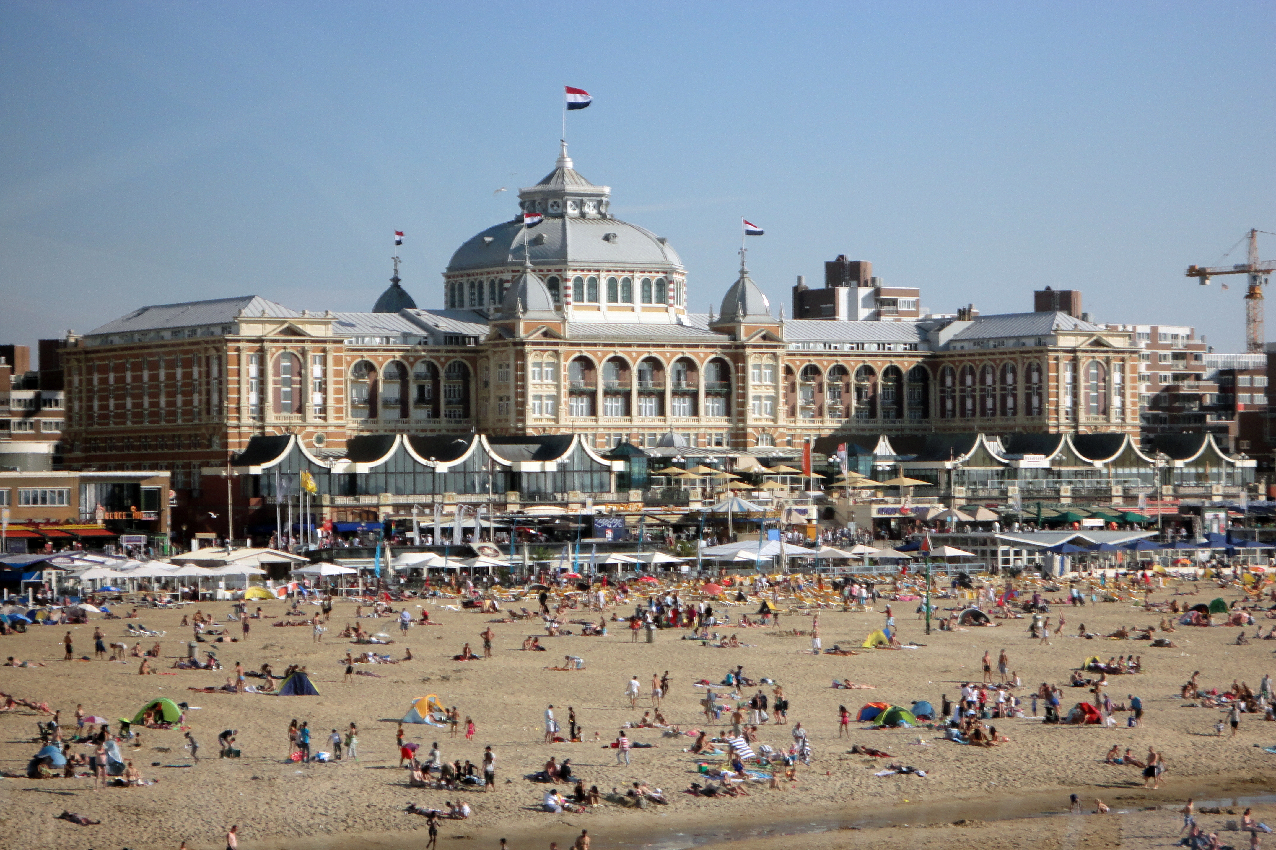 Het Steigenberger Kurhaus Hotel.. vanaf de pier van Scheveningen.